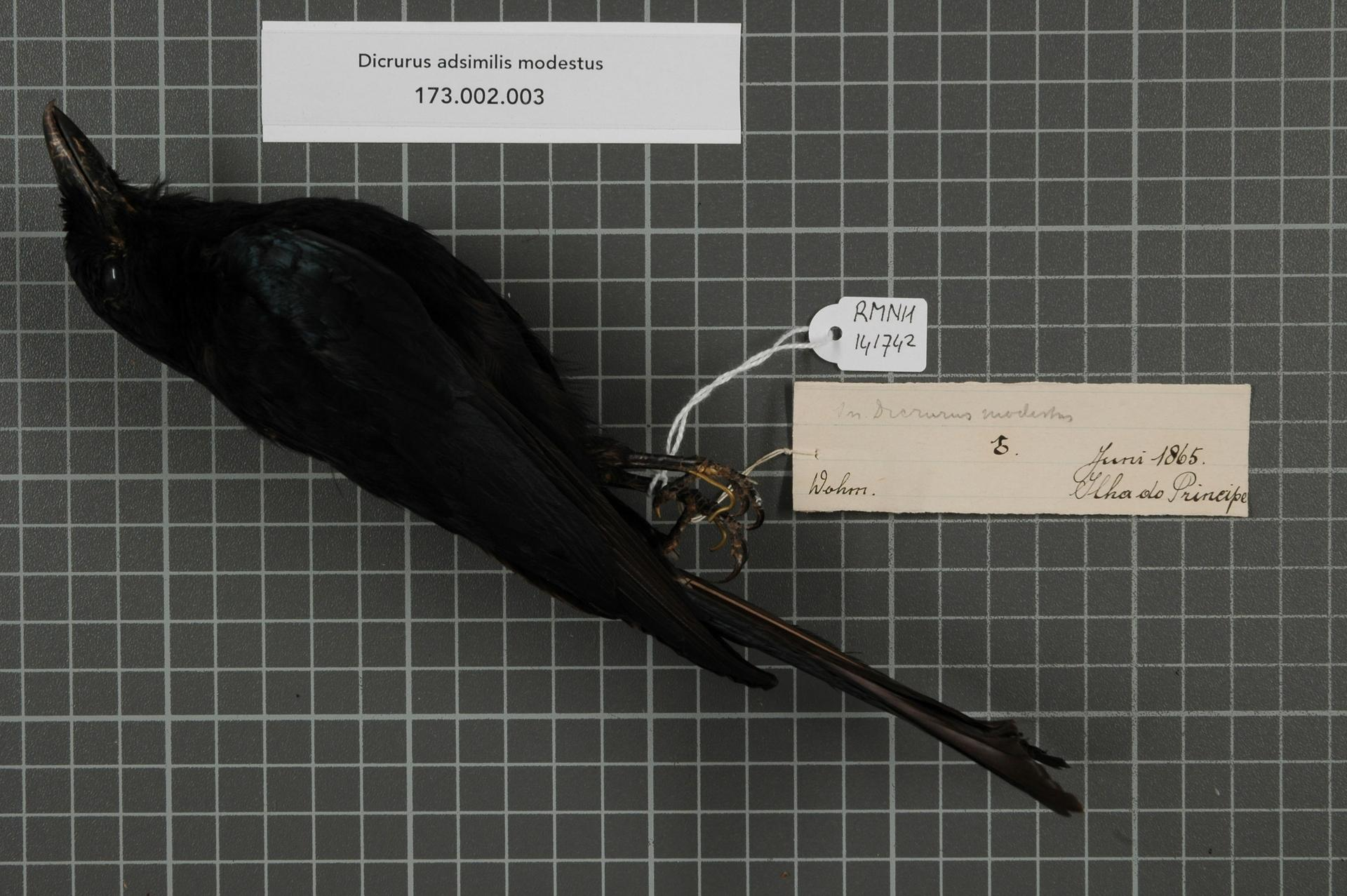 Dicrurus adsimilis modestus Hartlaub, 1849